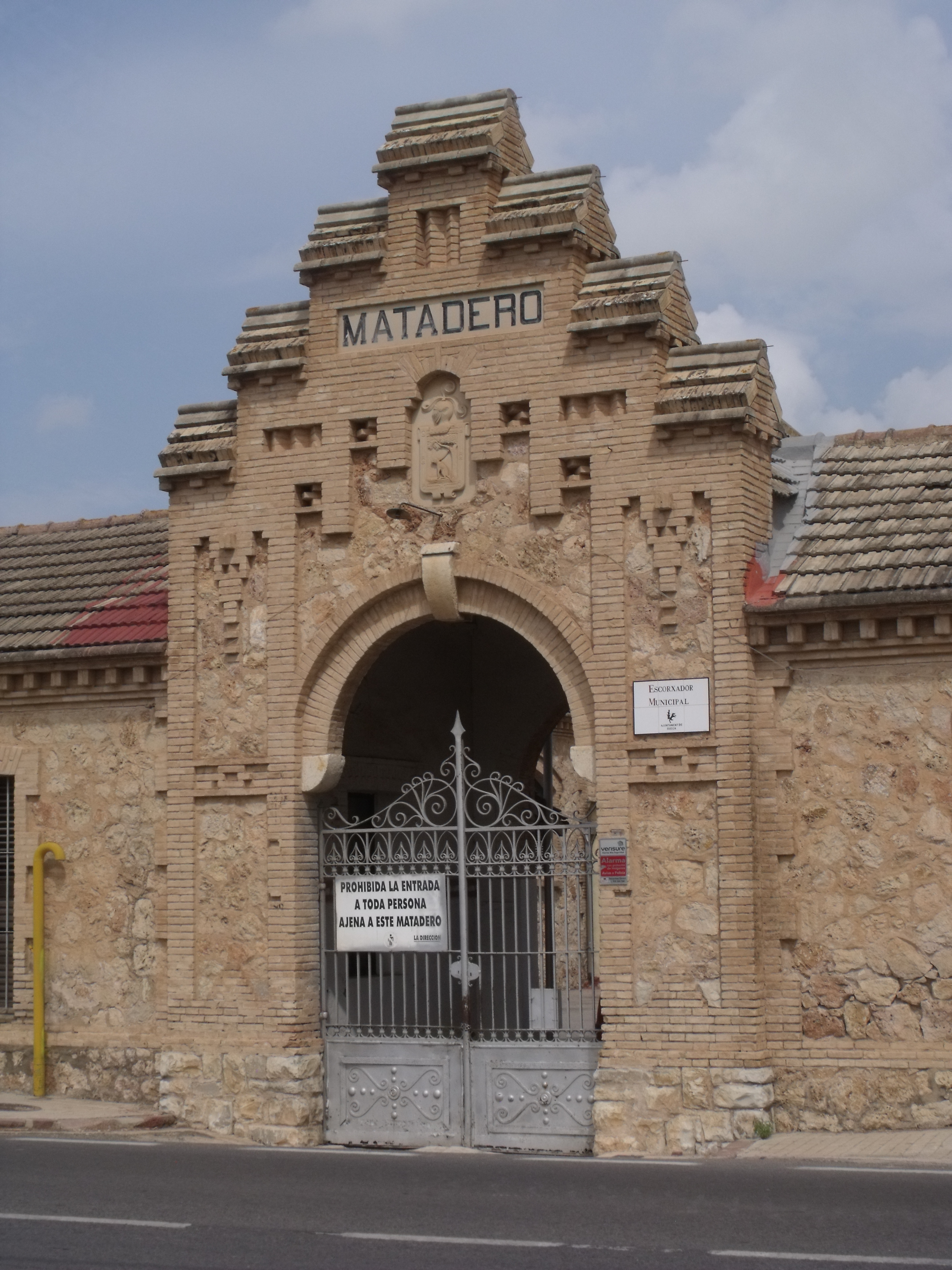 Edificio del antiguo matadero municipal de Sueca